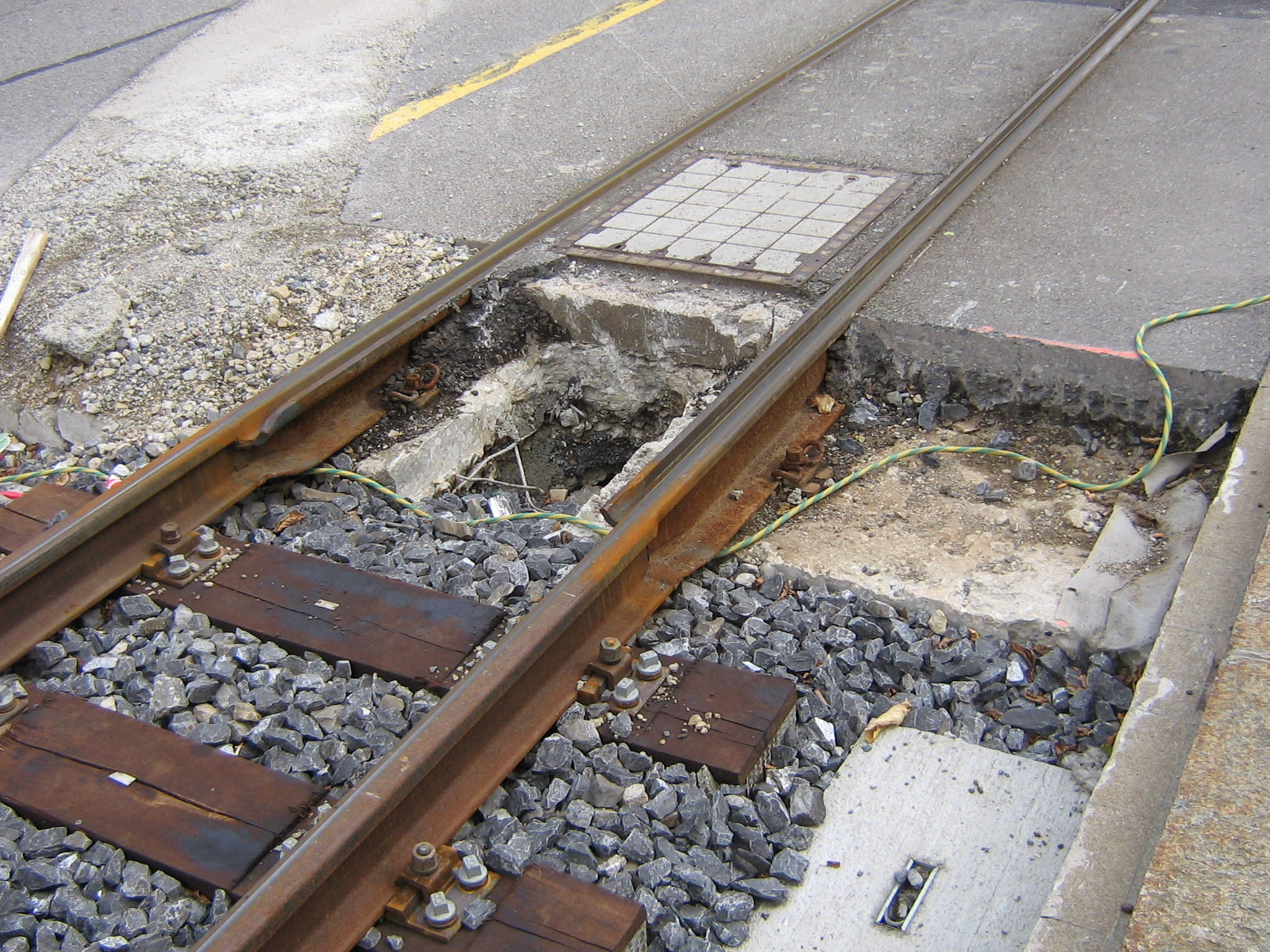 Limite entre les rails de type vignole et les rails à gorge en zone urbaine de la ligne. Chantier de la gare d'Union-Prilly.